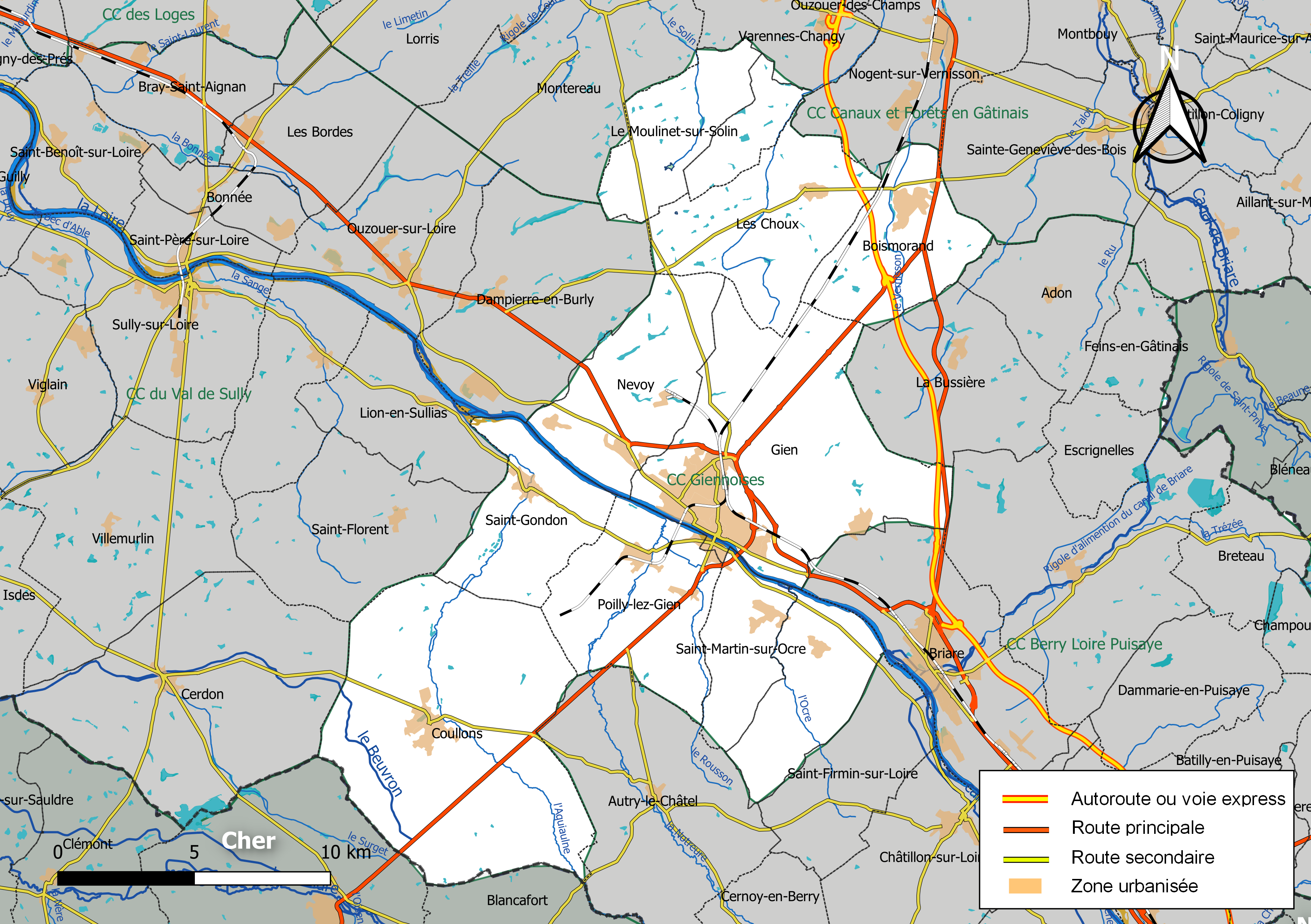 Carte géographique de la communauté de communes giennoises, département du Loiret, France. Composition au 1er janvier 2019.